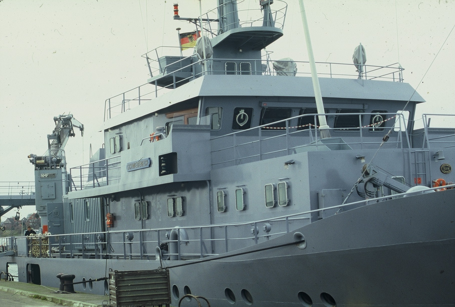 Fotografie des Forschungsschiffs Schwedeneck in Reykjavik